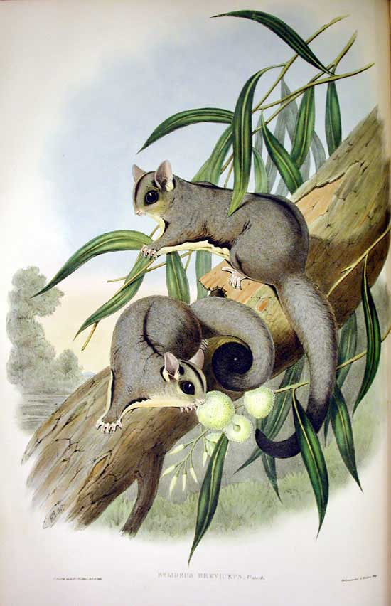 Petaurus breviceps